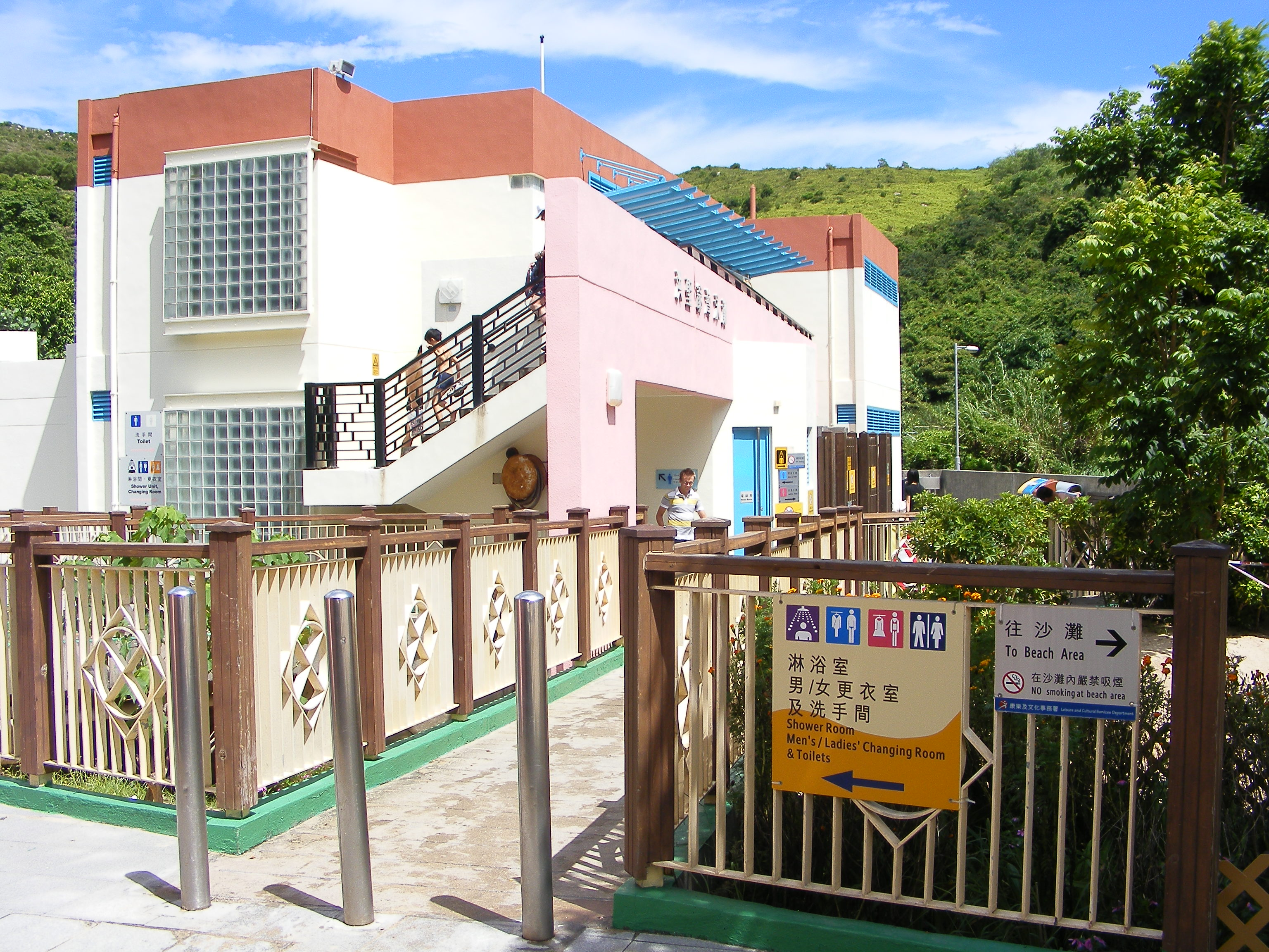 Lamma Island, Hong Kong